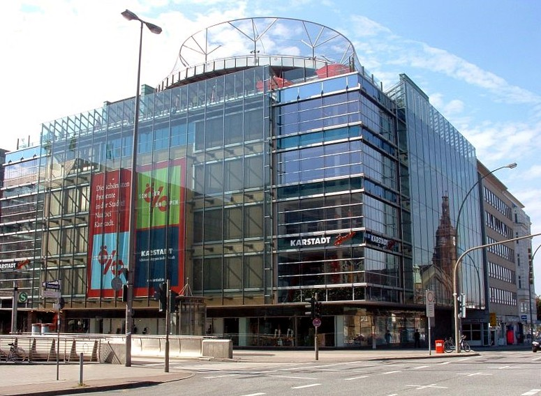 Kaufhaus Karstadt Sport in der Mönckebergstraße in Hamburg